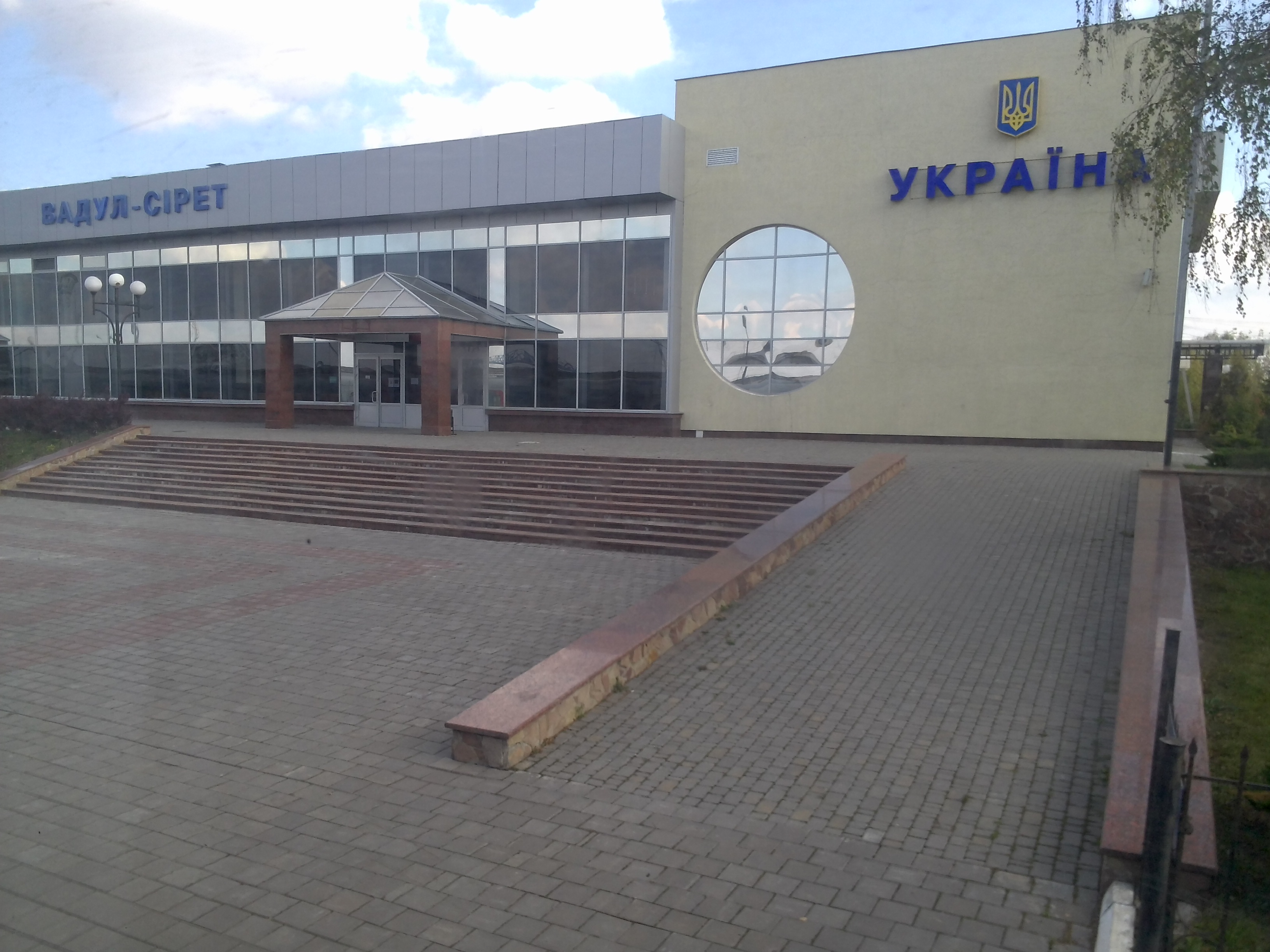 ст. Вадул-Сірет